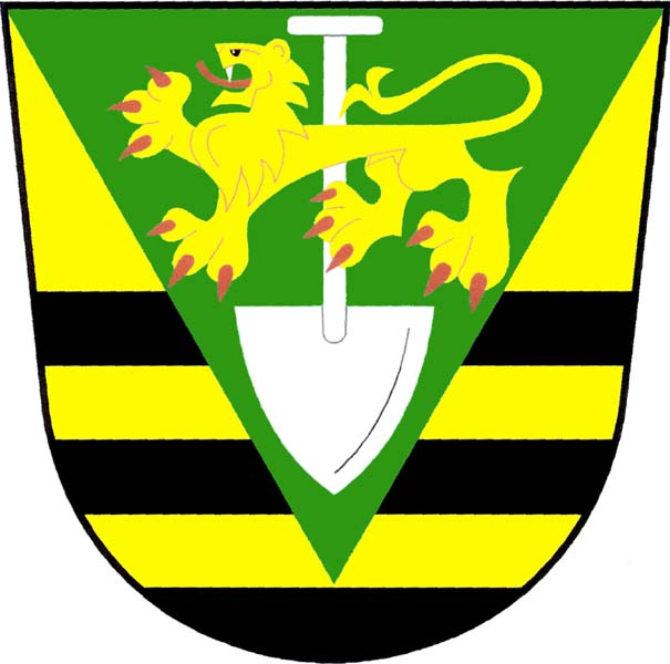 Znak obce Rozsíčka